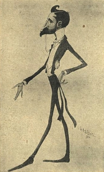 Шарж на князя Сергея Михайловича Волконского, директора Императорских театров.